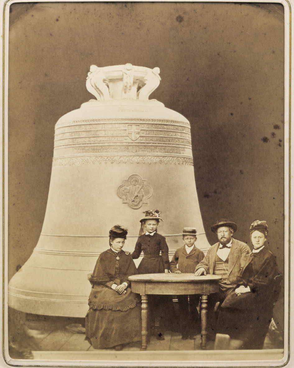 Andreas Hamm, Frankenthal (Pfalz), mit der von ihm gegossenen Kaiserglocke "Gloriosa", für den Kölner Dom, 1875.